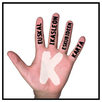 Euskal Ikasleon Eskubideen Kartako logotipoa